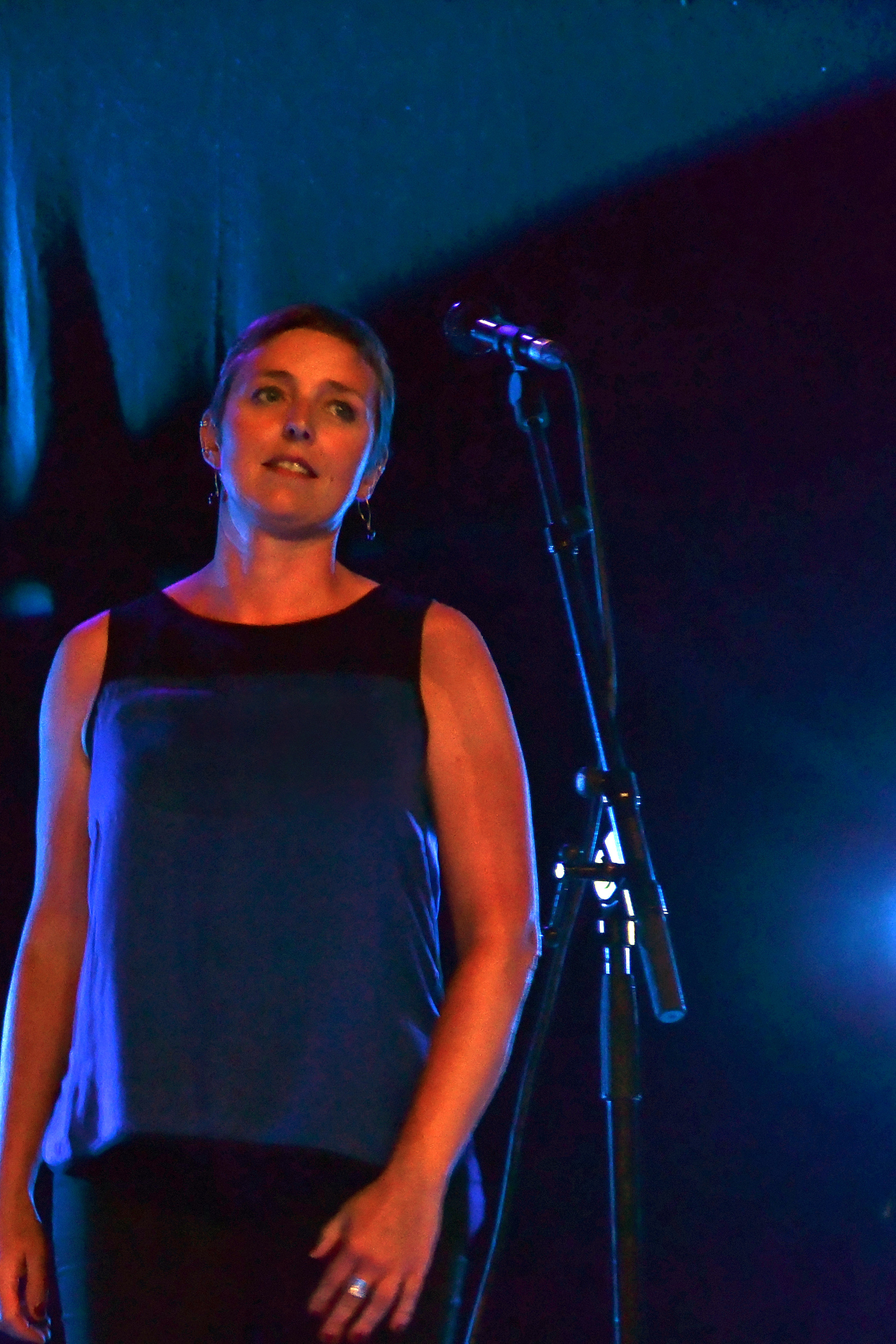 Tan De'i en fest-noz à l'espace Saint-Corentin lors du festival de Cornouaille le 25 juillet 2014.